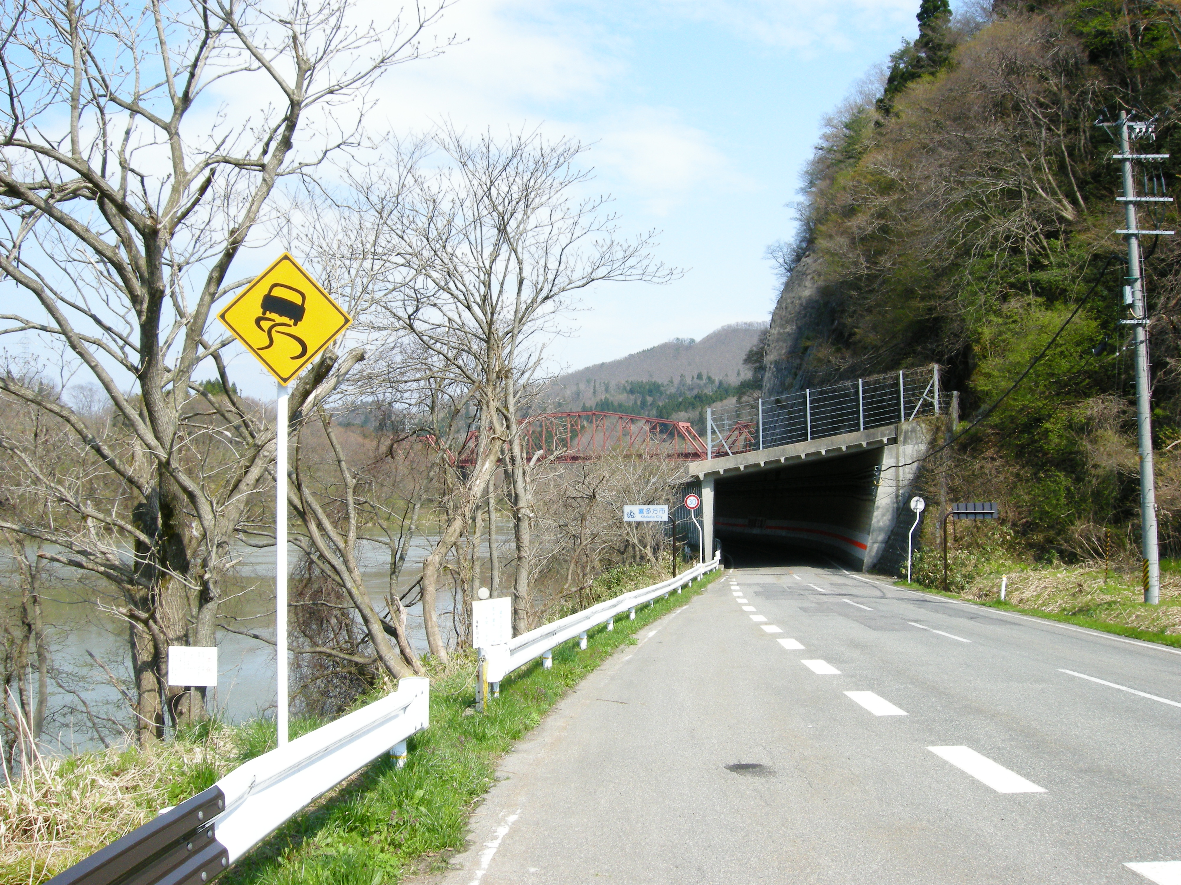 Fukushima Prefectural Road 16